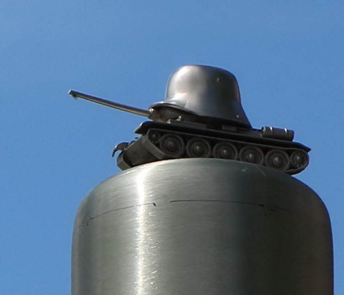 Praha-Řeporyje, plastika Davida Černého u pamětní desky ROA - detail